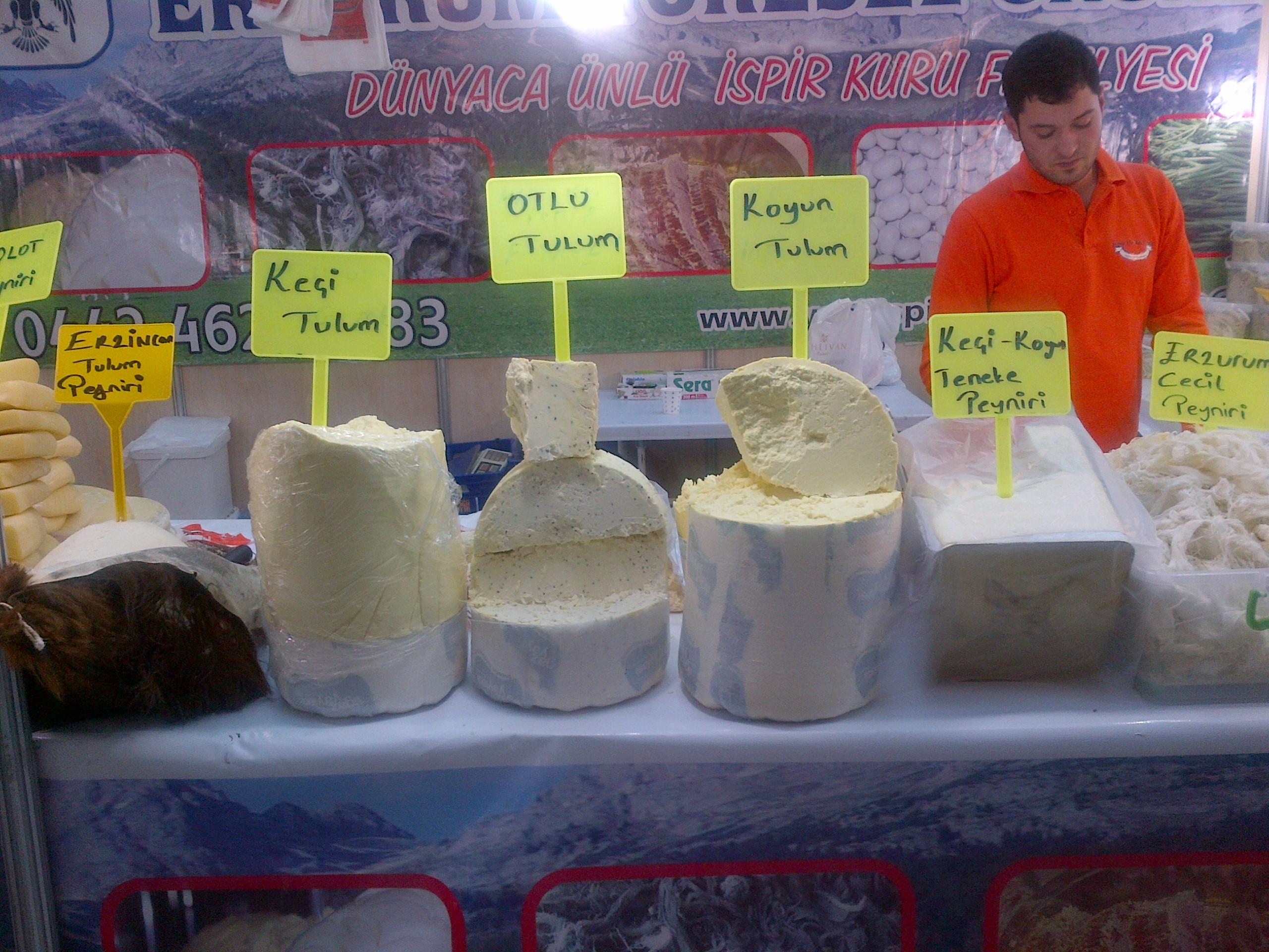 "Tulum peyniri" con hierbas, de la Region del Mar Negro de Turquia.